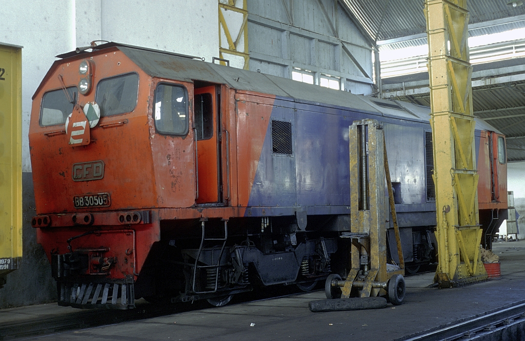 PTKABB305.04 (05 A)